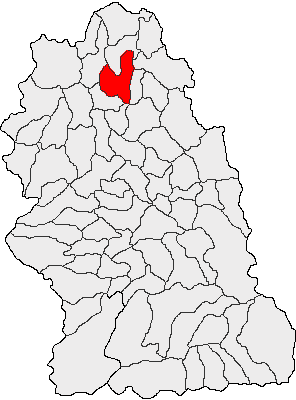 Categorie:Hărţi ale judeţului Hunedoara